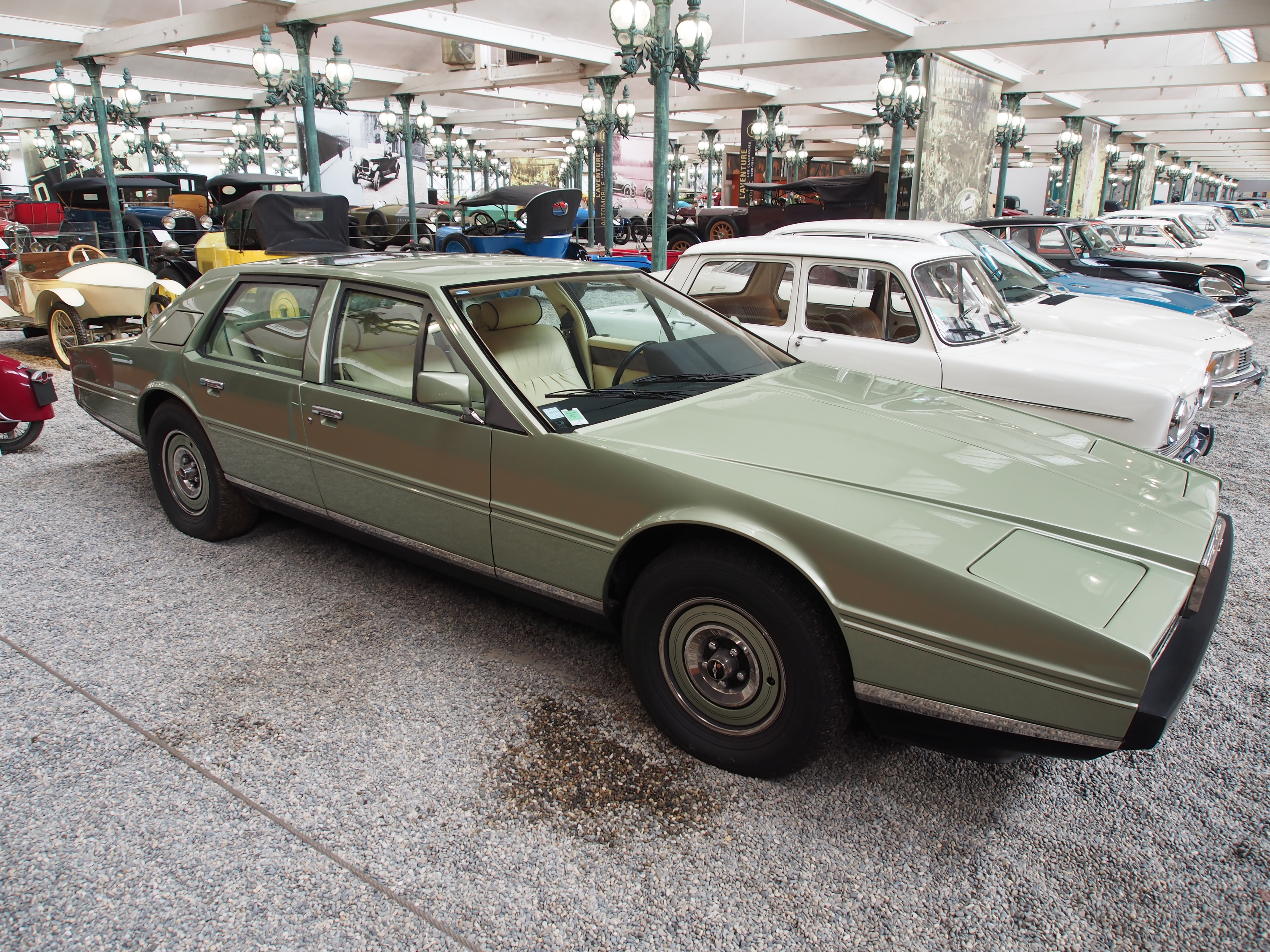 Photographed at Musée National de l'Automobile, France.